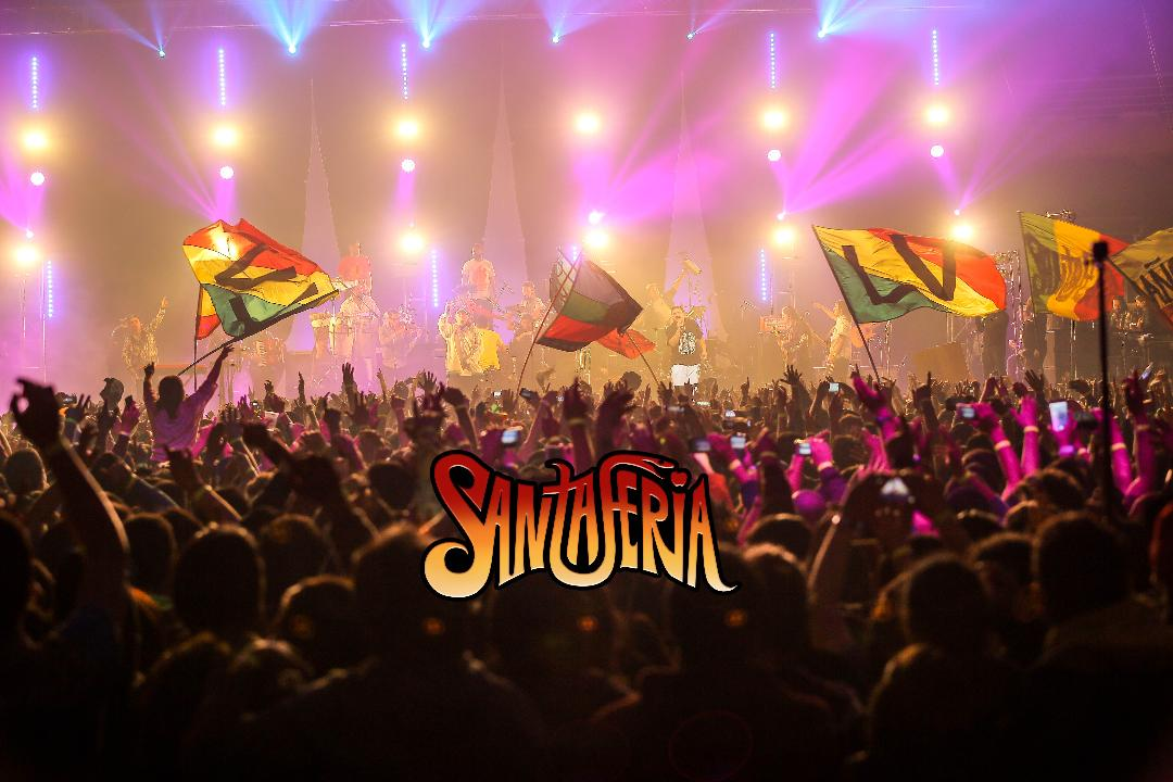 Santaferia en concierto